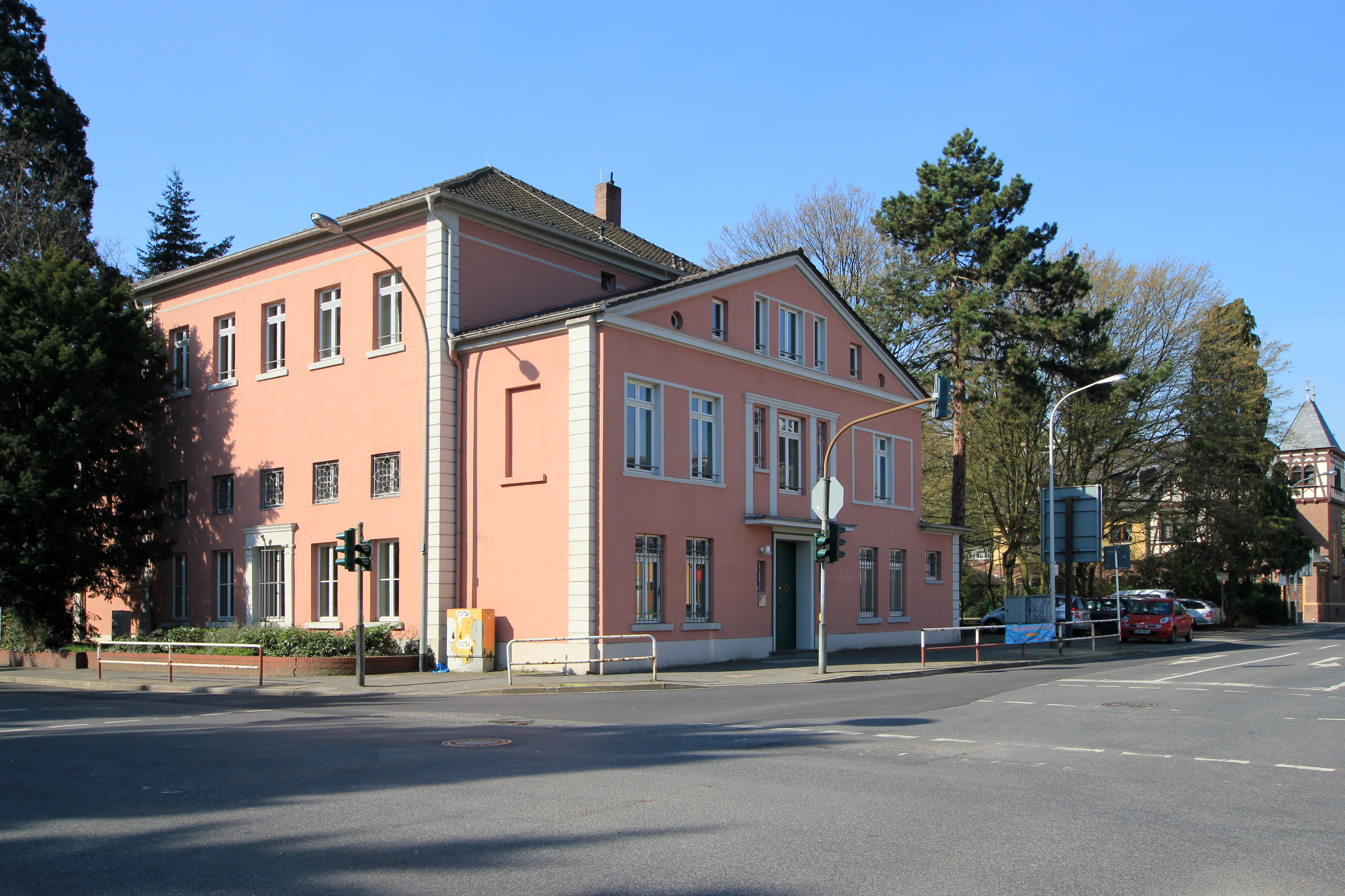 Villa Camphausen, Kaiserstraße 1, Brühl. Eine um 1850 im italienischen Landhausstil errichtete Sommerresidenz des Bankiers Ludolf Camphausen.